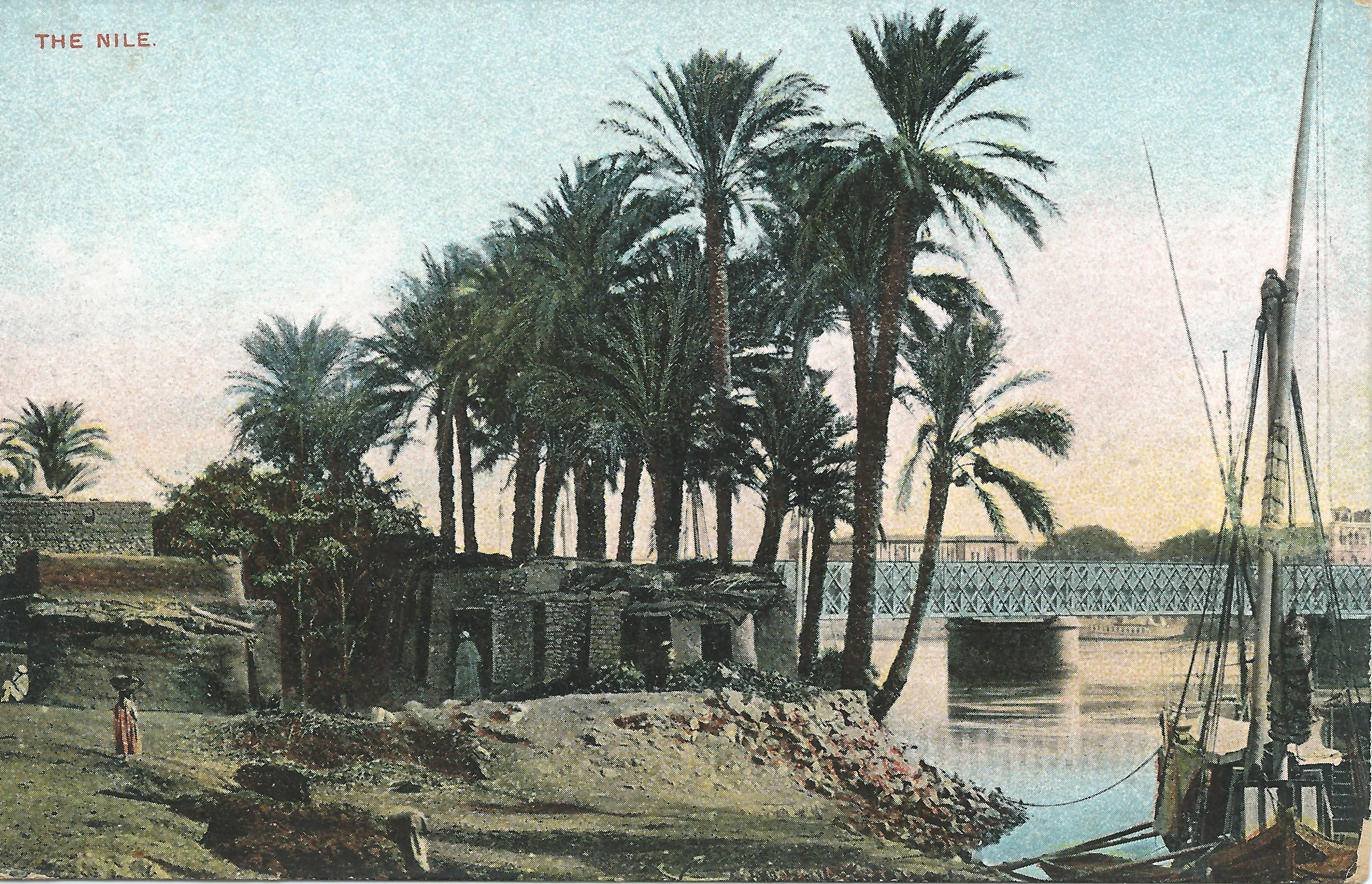 Briefkaart van een dorp aan de Nijl